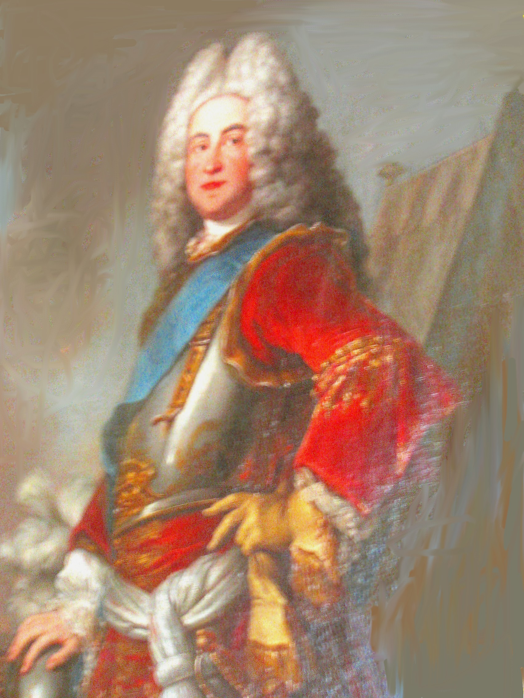 Portrait of Stanisław Poniatowski (1676–1762)